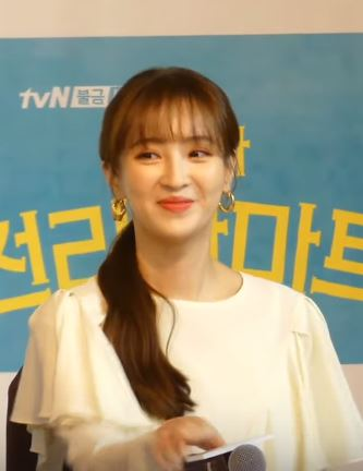 16일 오전 서울시 마포구 도화동 베스트웨스턴프리미어 서울가든호텔에서 tvN 새 금요드라마 '쌉니다 천리마마트' 제작발표회가 열려 배우 가 참석해 포토타임을 갖고 있다.